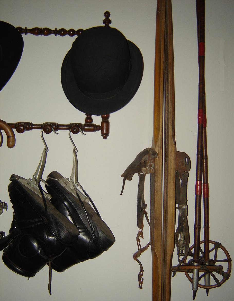 Sprzęt narciarski w przedpokoju - Kamienica Hipolitów